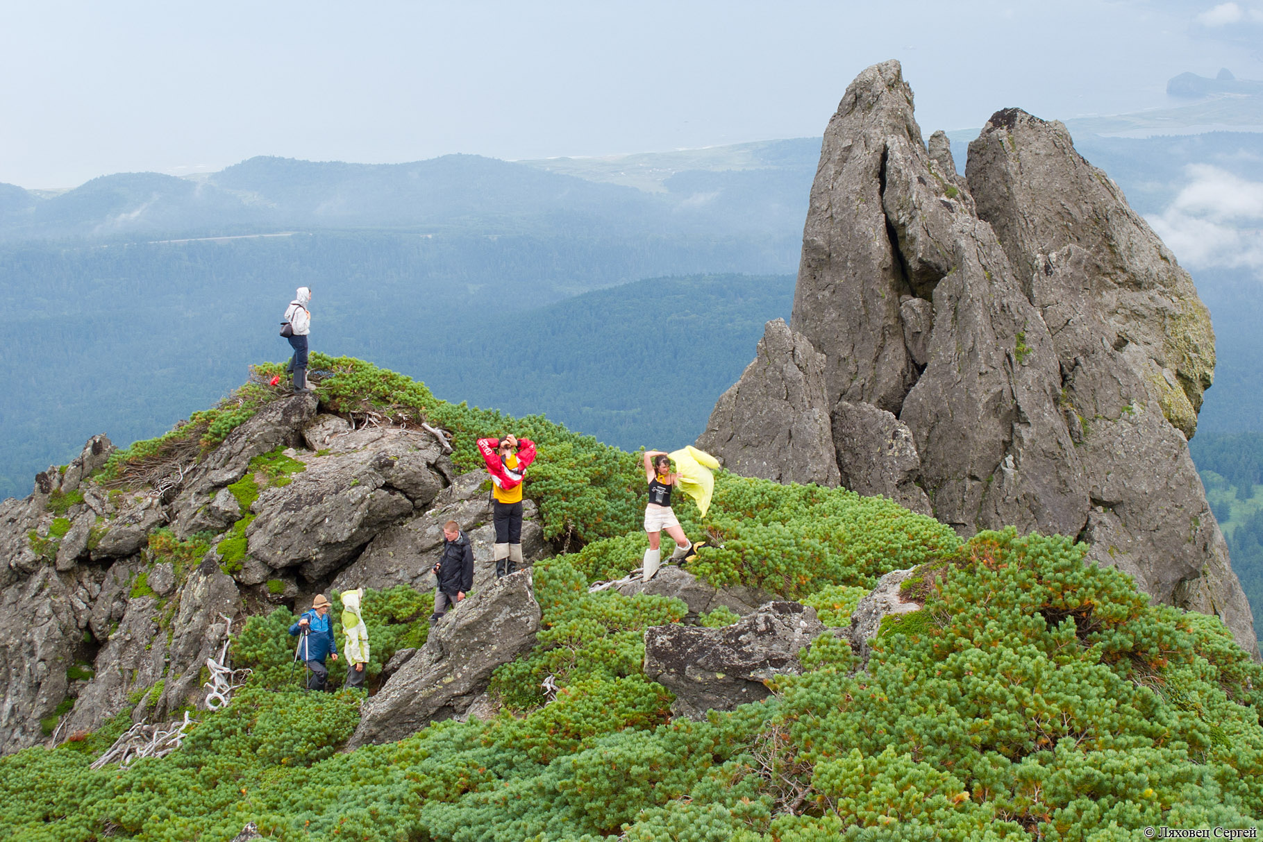 Вулкан Менделеева: Центр - 43°58'38" N 145°44'22" E.,Южно-Курильский городской округ, Сахалинская область This image is related to the protected area of Russia number 6510088